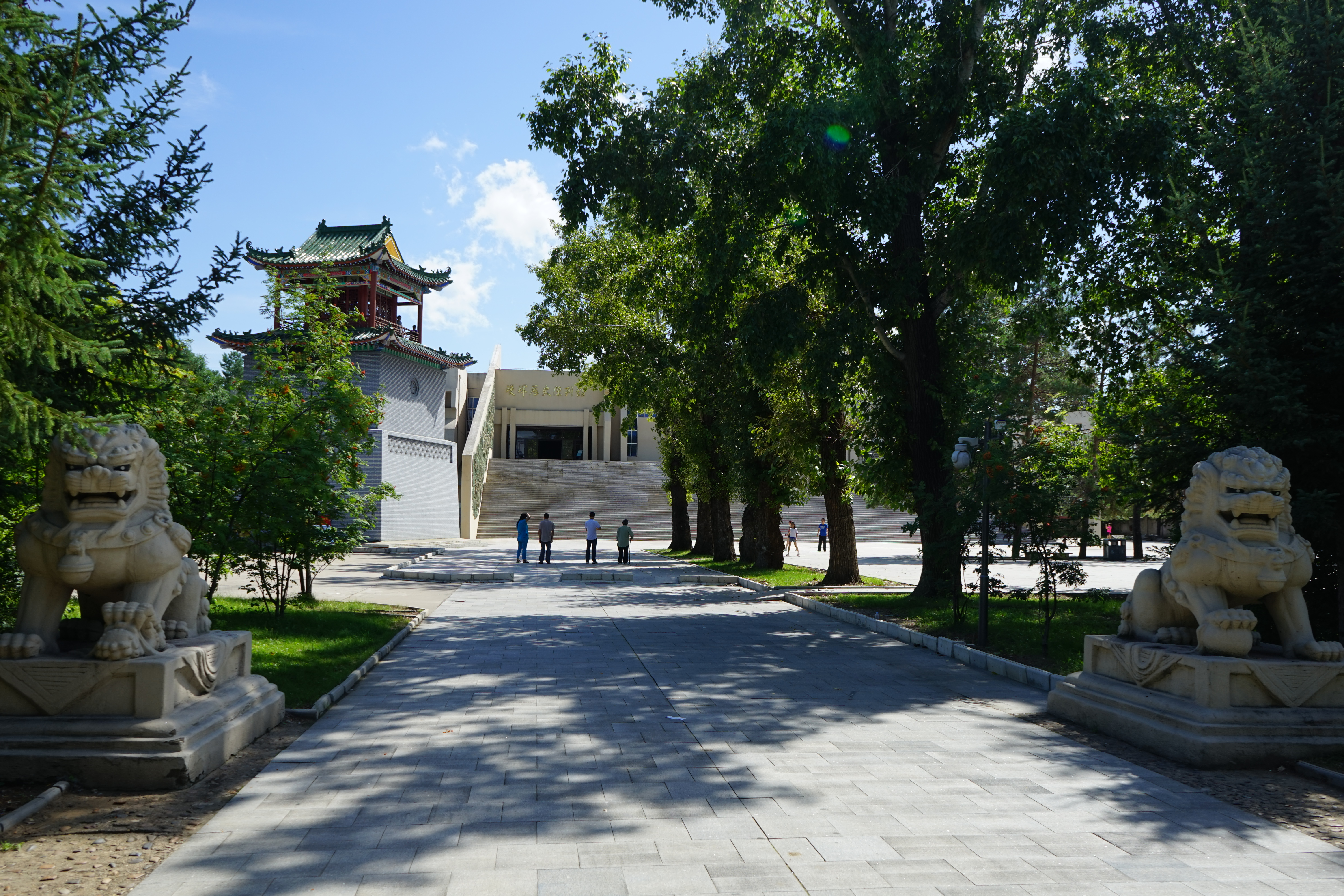 中文（中国大陆）: 瑷珲历史陈列馆、魁星阁